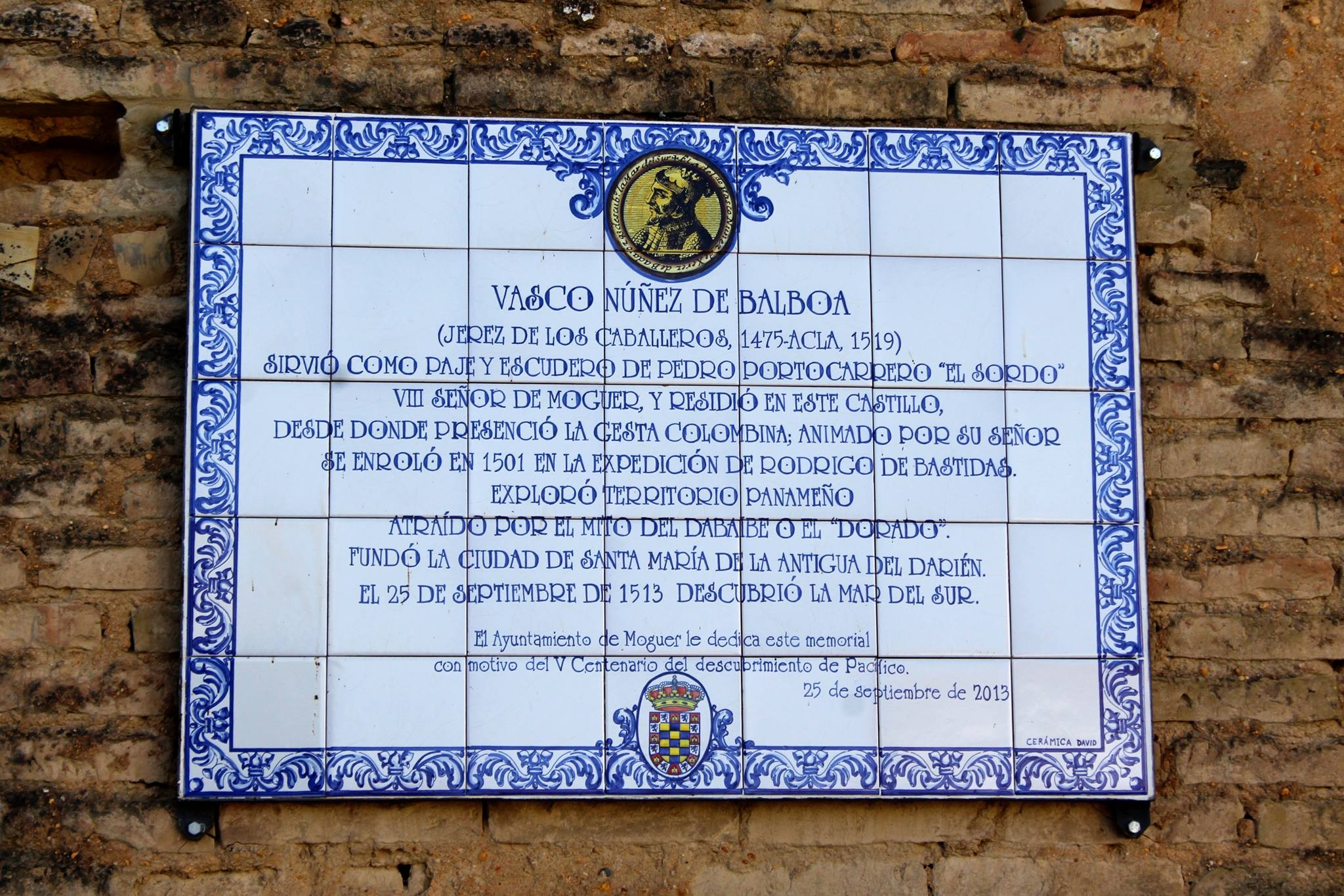 Placa homenaje a Vasco Nuñez de Balboa en el Castillo de Moguer (Huelva). Vasco vivío en el castillo unos años, sirviendo como escudero y paje de Pedro Portocarrero.